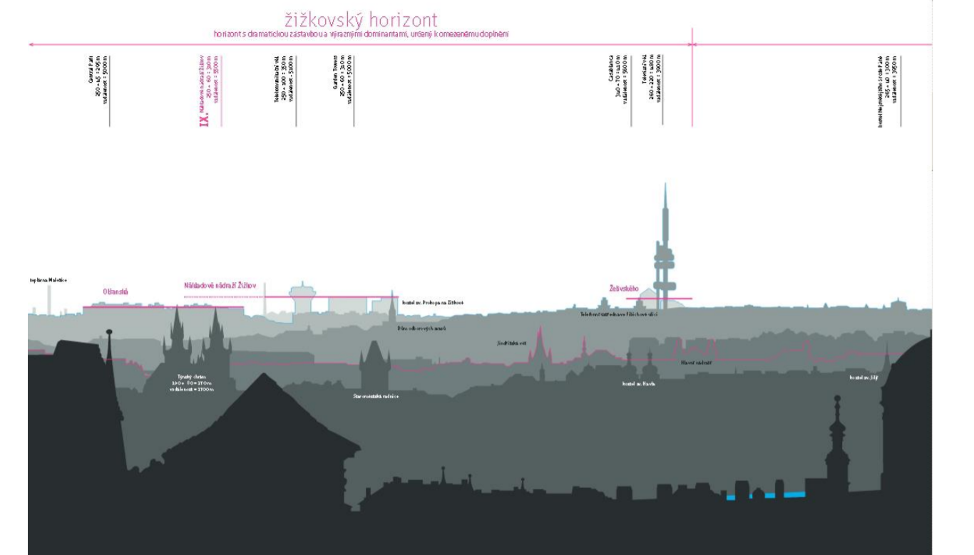 Візуальний горизонт Жижкова. В цьому районі розташовані такі визначні об’єкти Празька телевізійна вежа (найвища точка горизонту), цвинтар, на якому похований Франц Кафка.